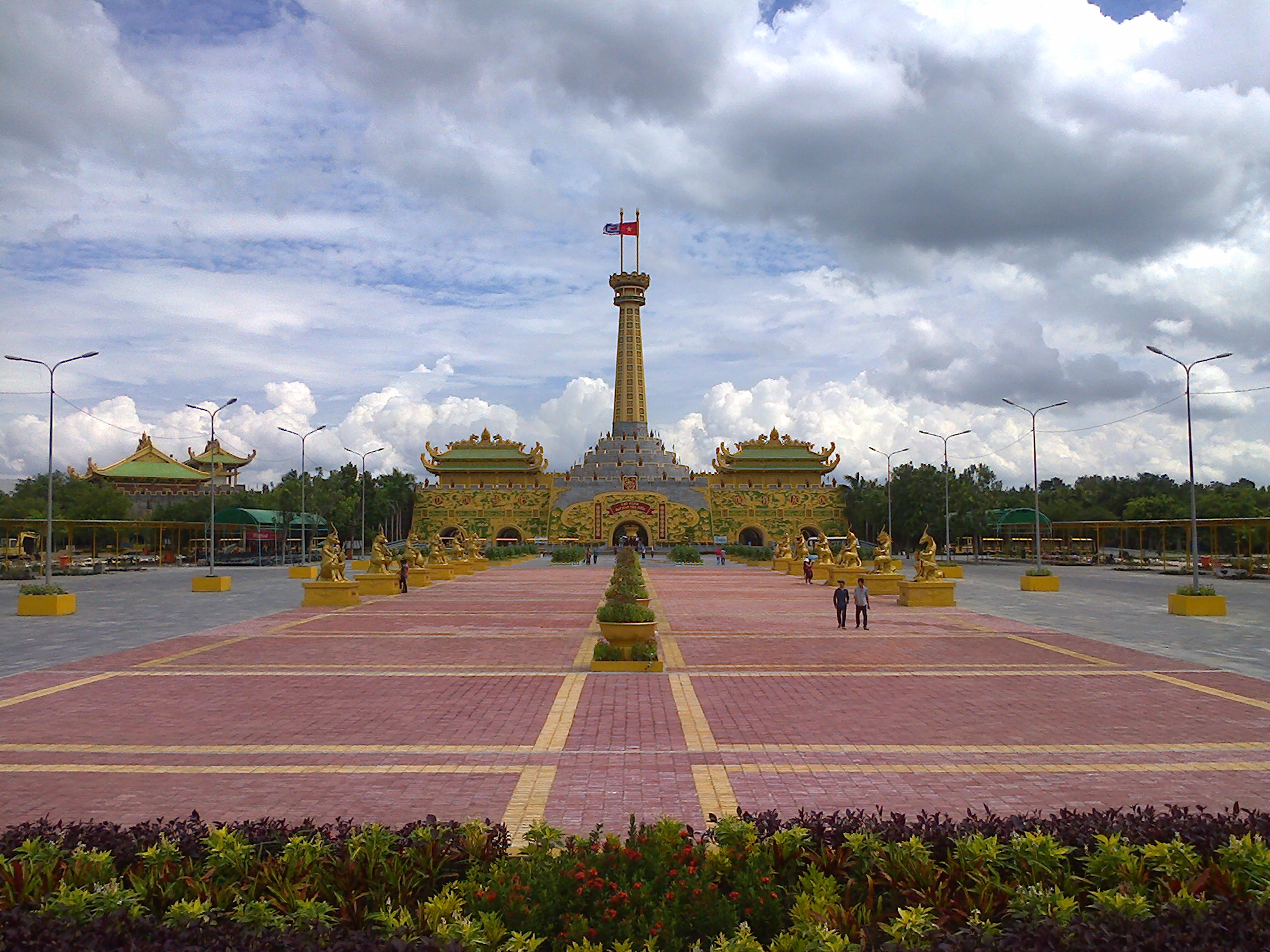 Quảng trường Đại Nam Văn Hiến